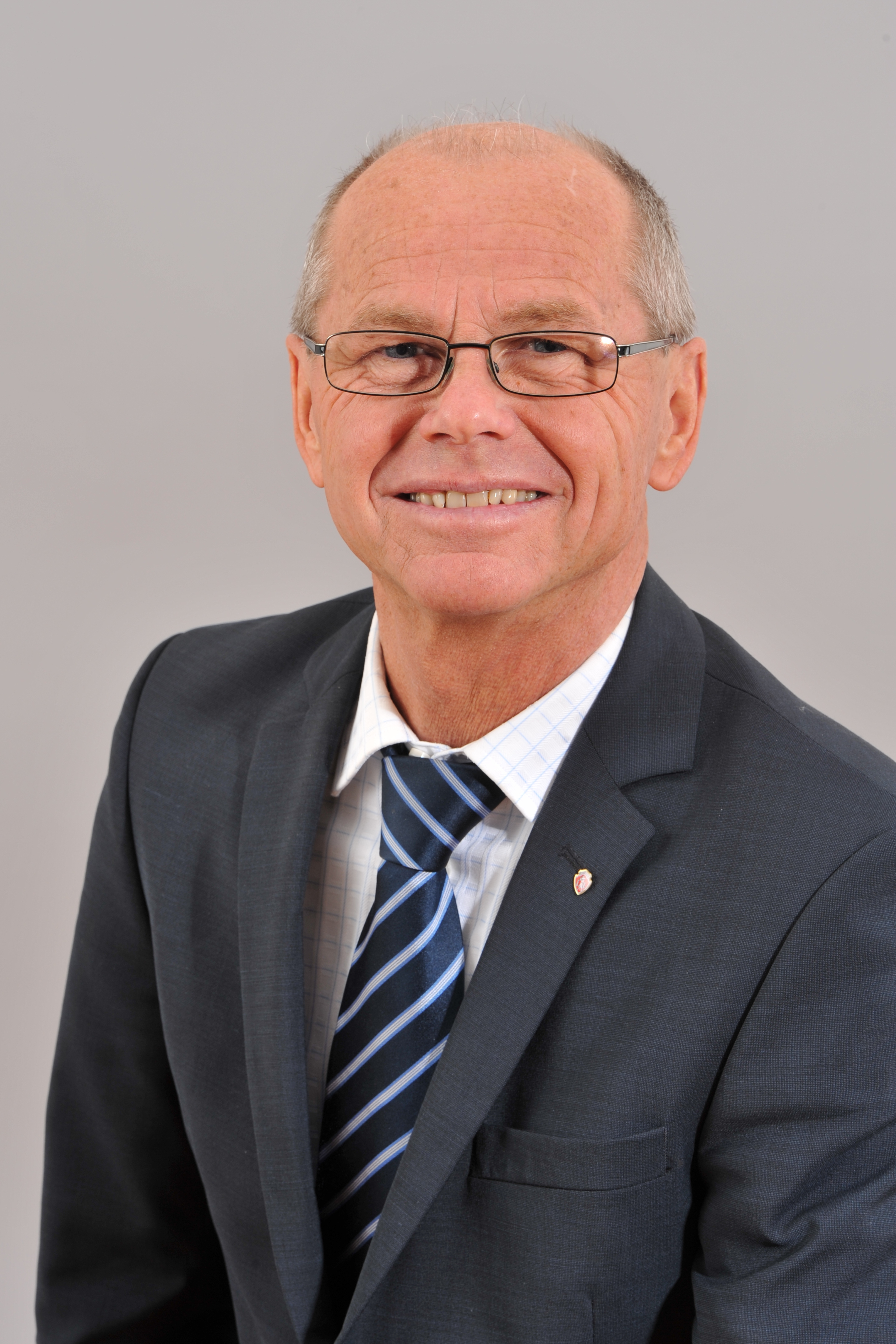 Landtagsprojekt Salzburg: Christian Stöckl